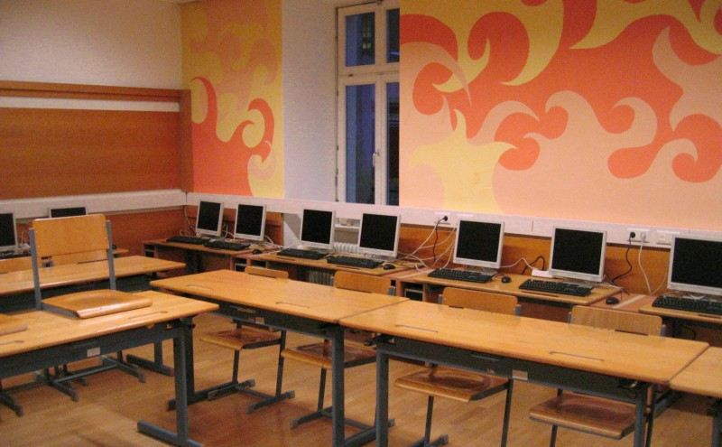 IT class at BRG APP, Adolf-Pichler-Platz 1, Innsbruck, Österreich